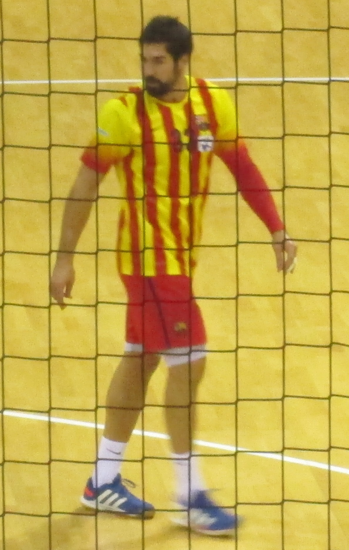 nikola karabatic barça